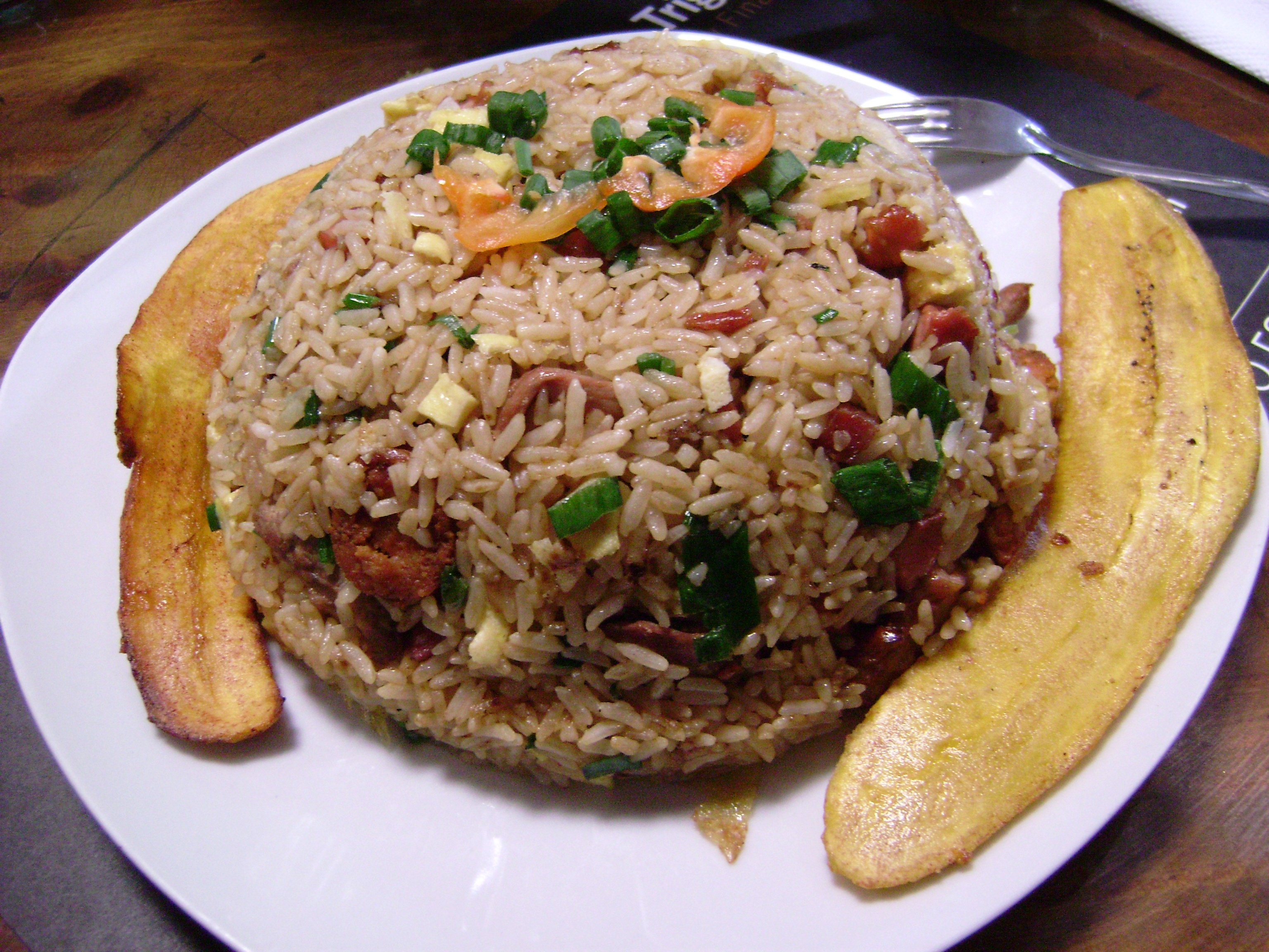 Chaufa Salvaje. hecho con cecina, carne de venado y cecina. Restaurant El Pichito. lima, Perú.